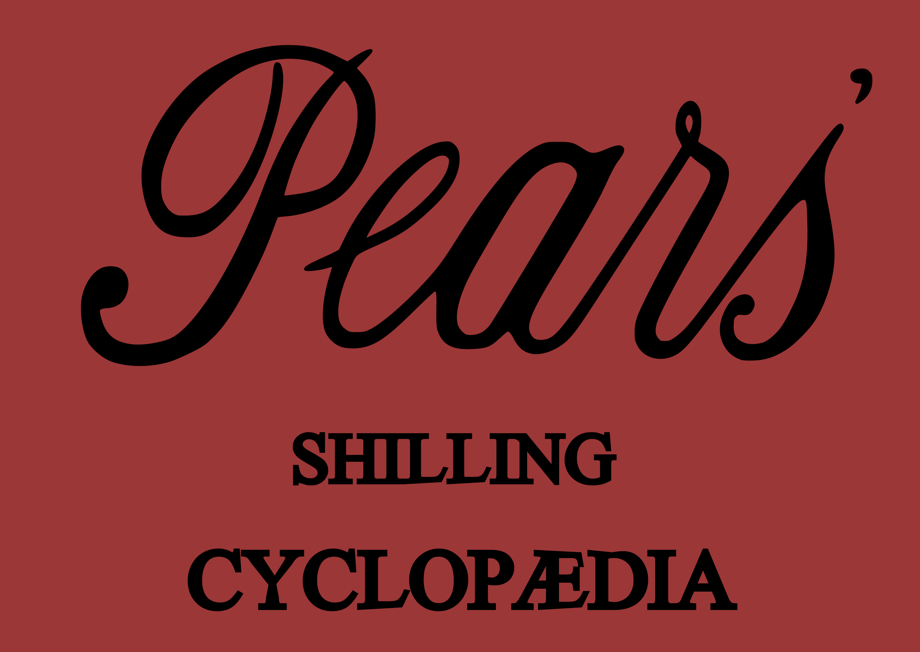 Portada de la Primera Edición de la Enciclopedia Pears (1897). Cabecera